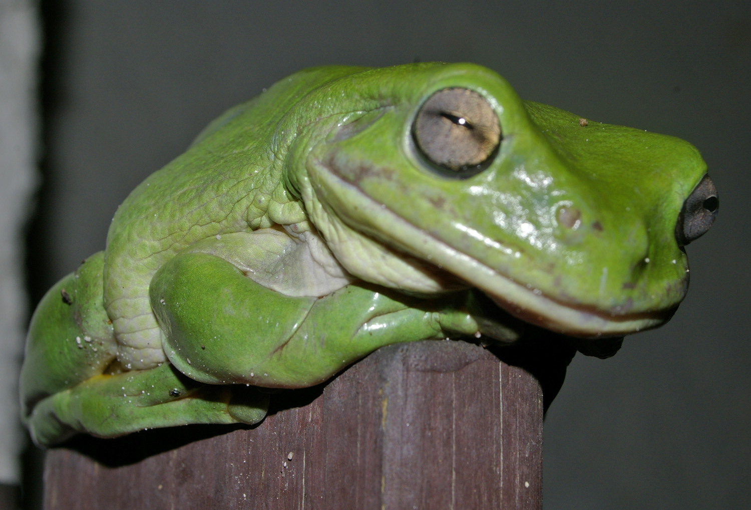 Litoria caerulea (Green Tree Frog)